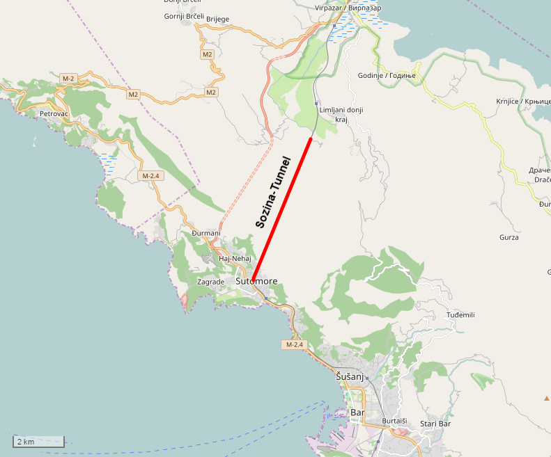 Lagekarte des Sozina-Tunnels